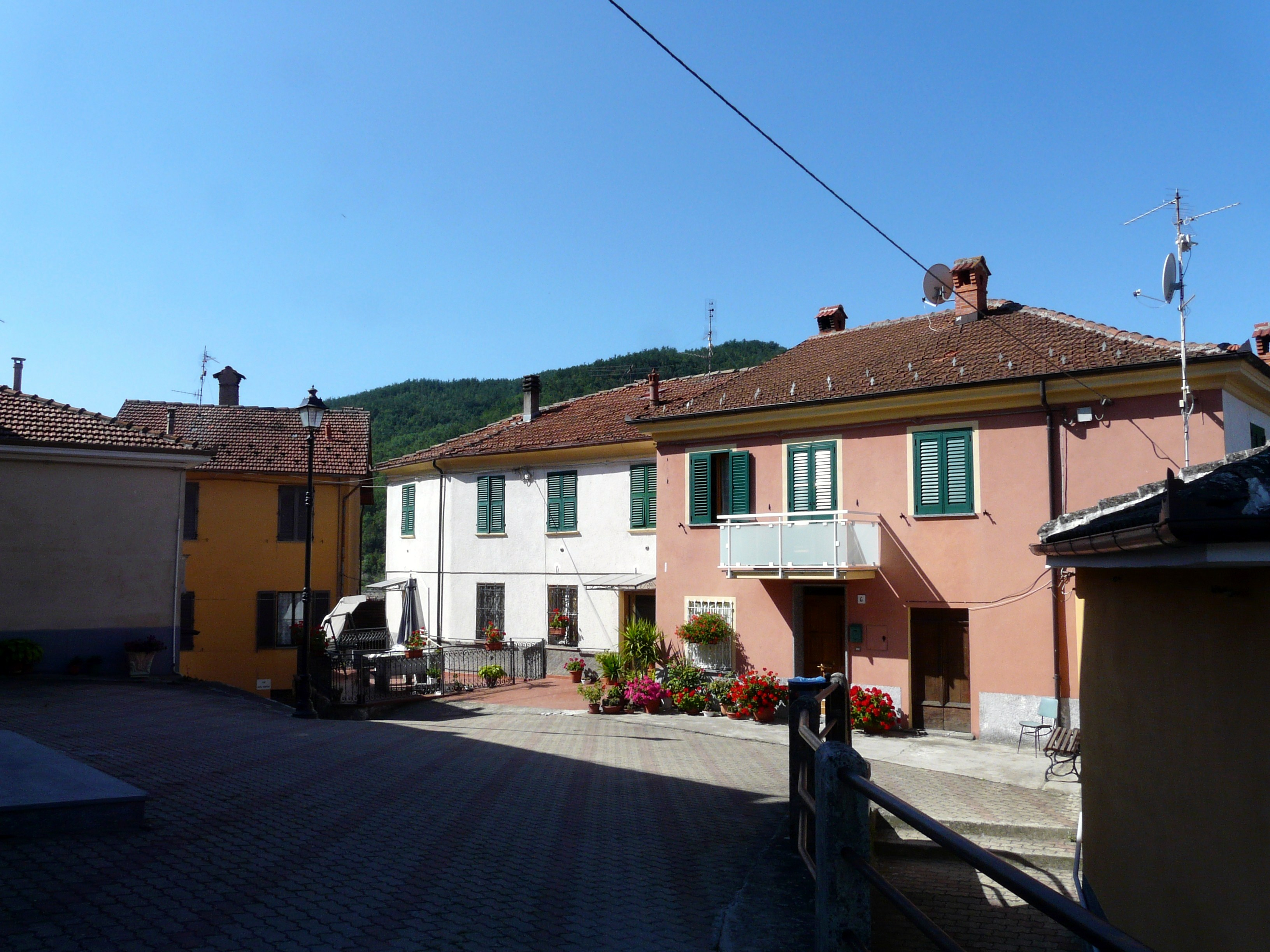 Centro storico di Albera Ligure, Piemonte, Italia